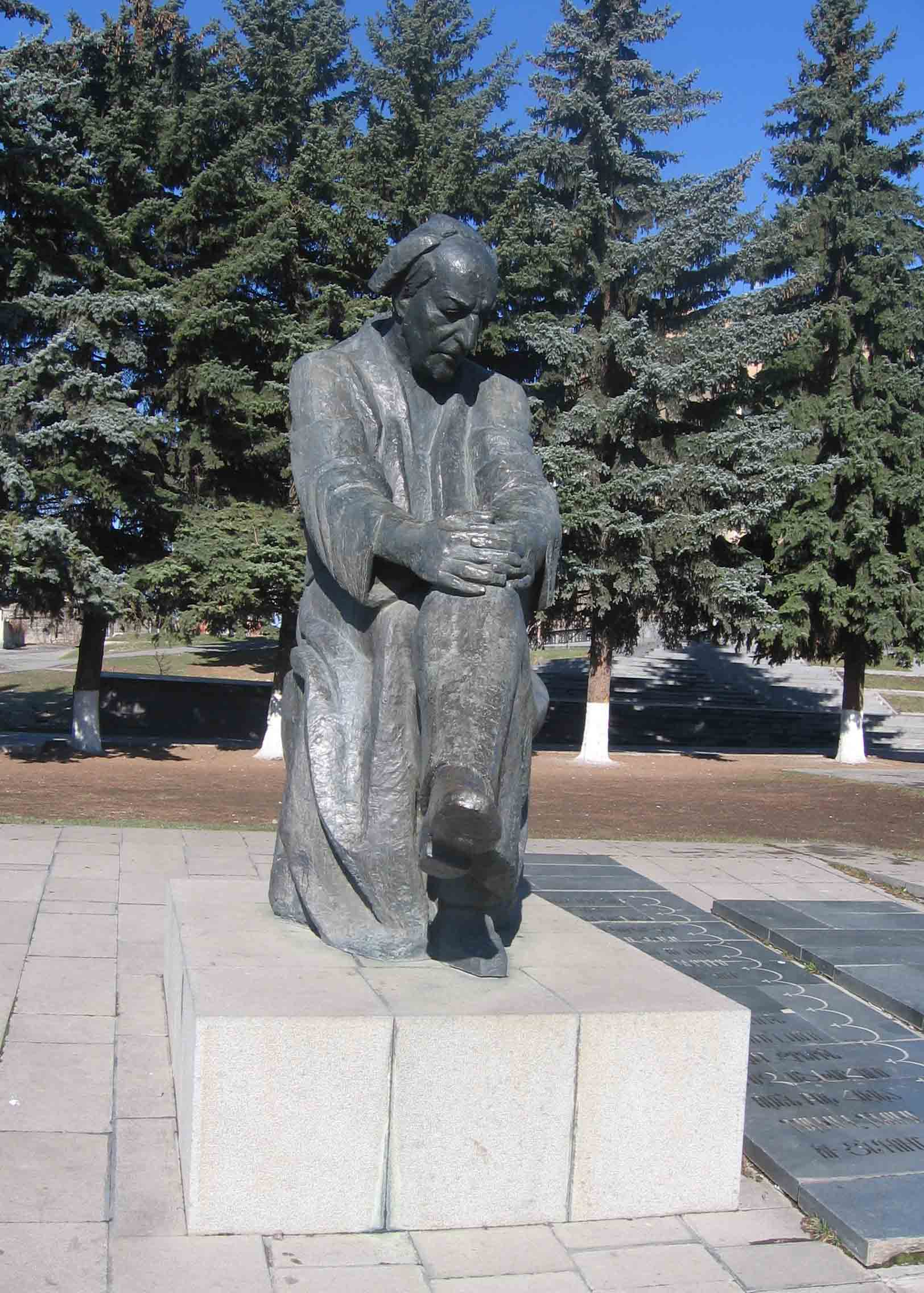 statue D'Avetik Issahakian a Gumri